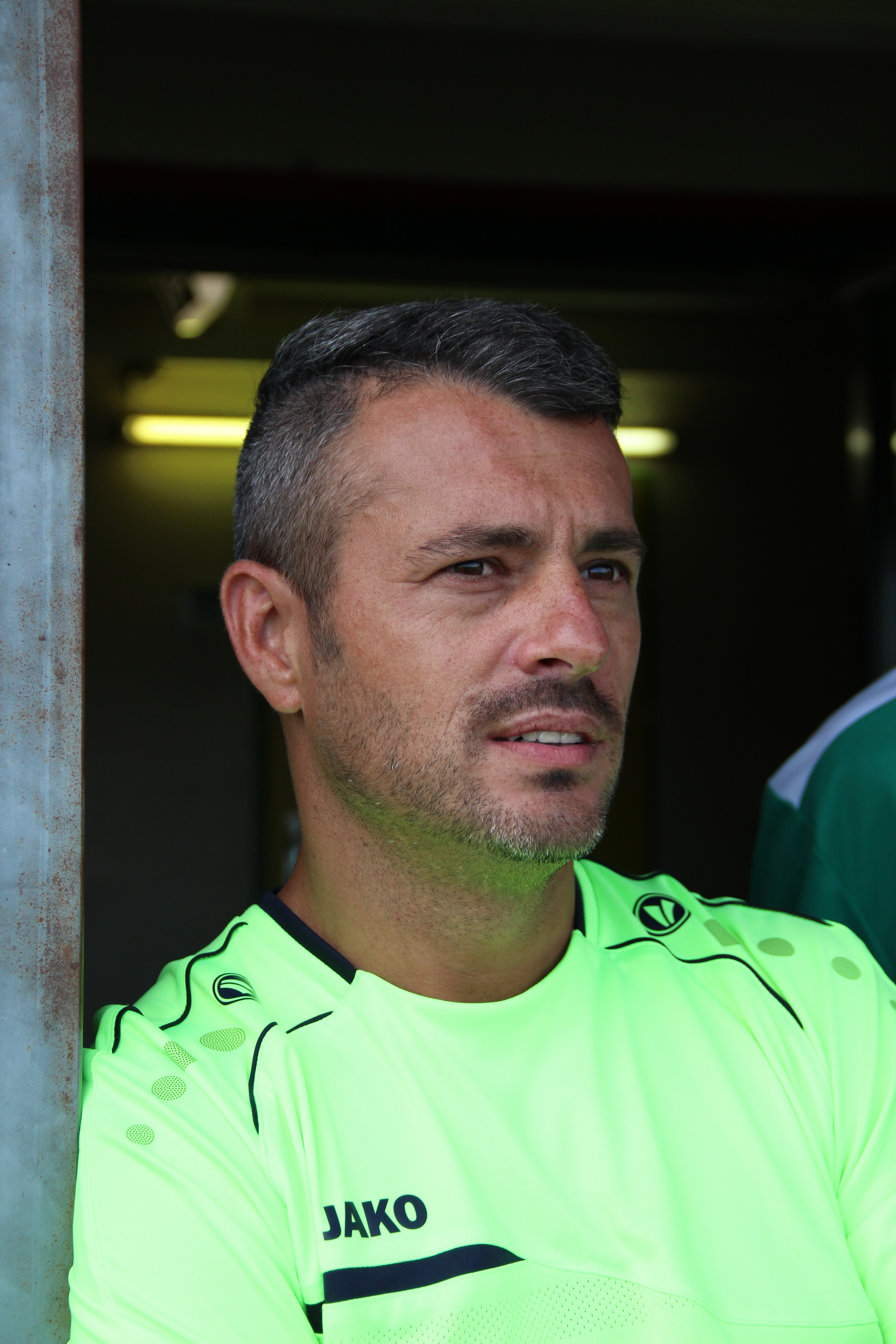 Zeltweger Legendenturnier 2018